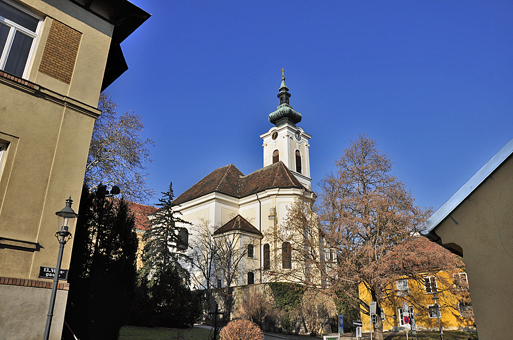 Ober St. Veit, Pfarrkirche